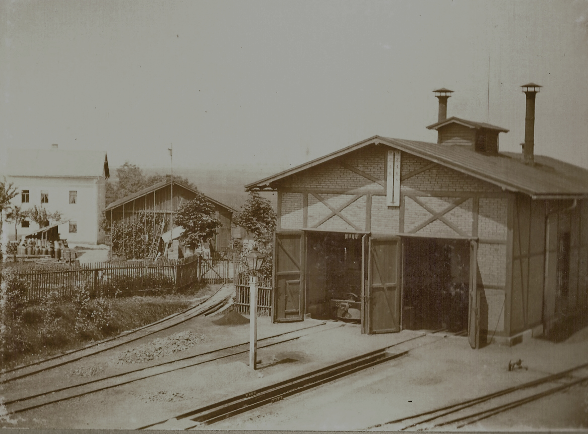 Das erweiterte Heizhaus mit Lok der Gattung IVK um 1895